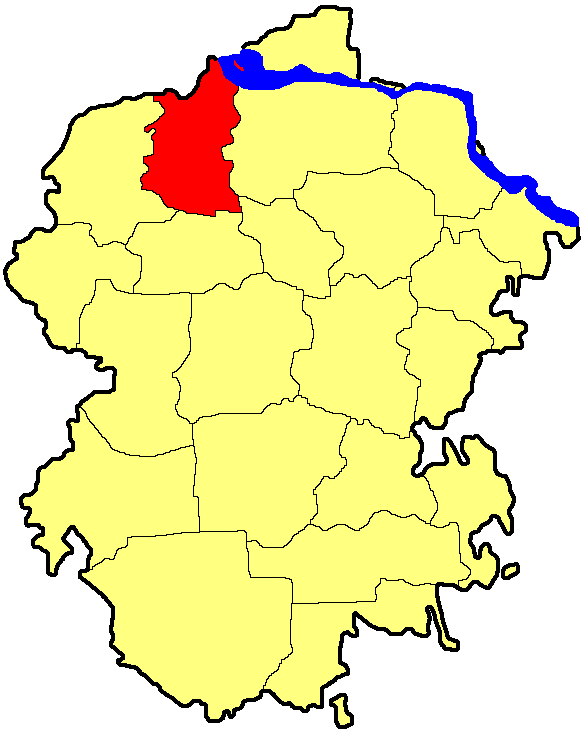 Моргауський район Чувашії